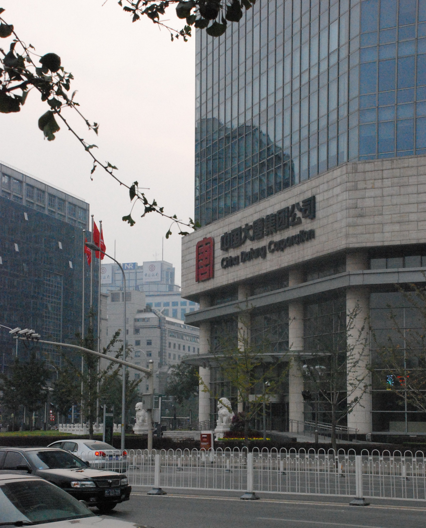 大唐